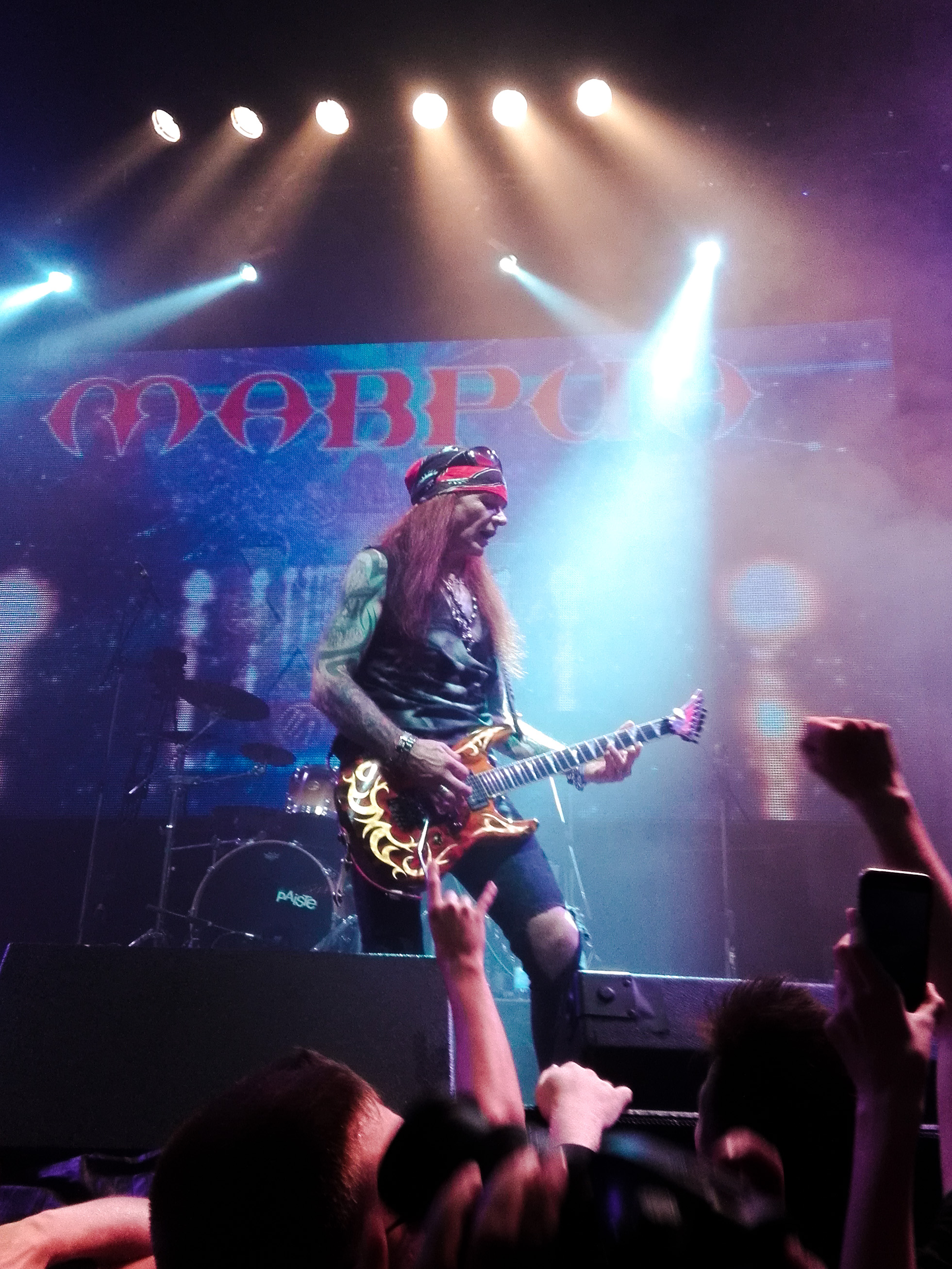 Сергей Маврин на концерте группы "Маврин", 20 лет группе "Маврин"